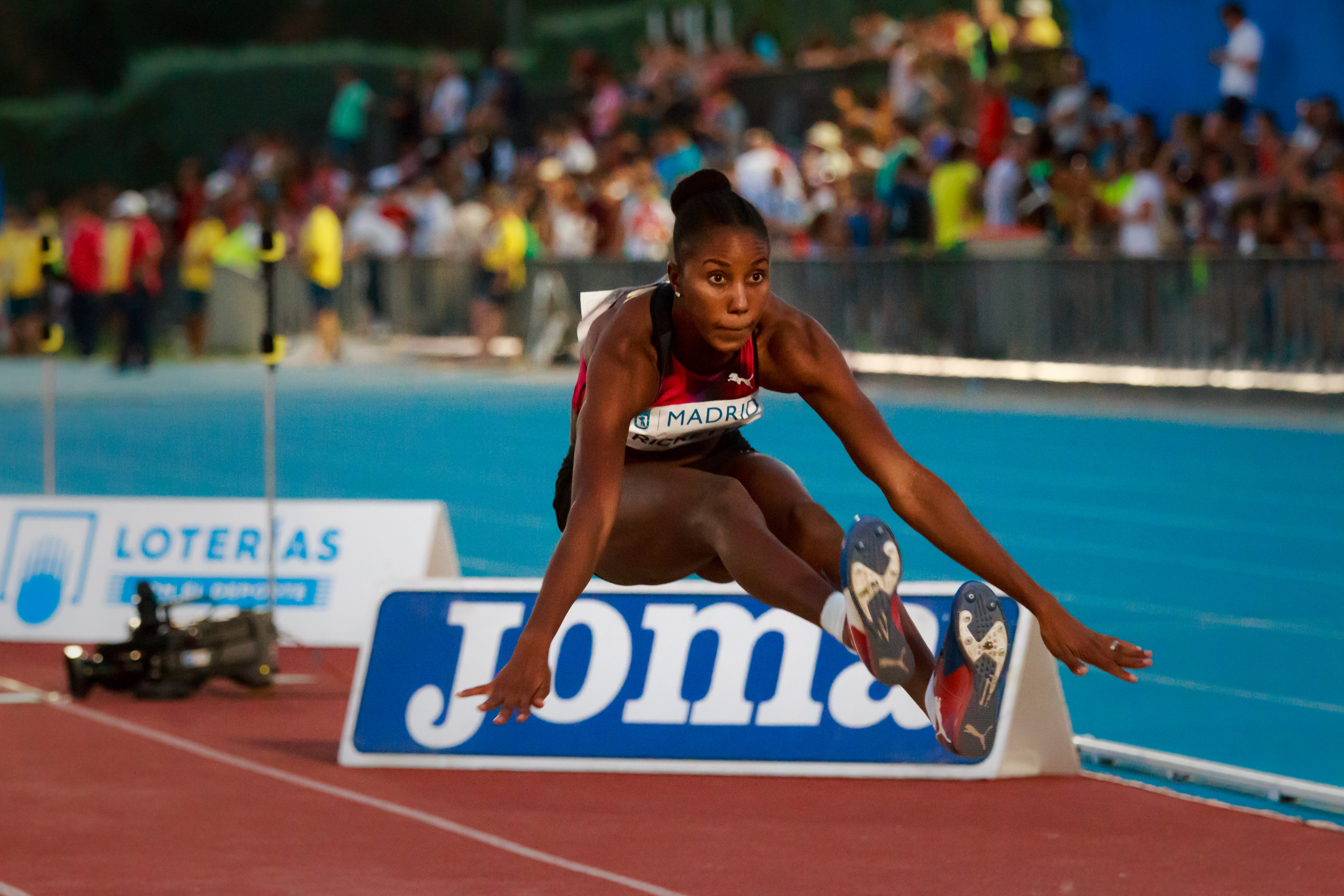 Shanieka Ricketts (JAM). Triple salto. IAAF World Challenge. Meeting Madrid 2017. Moratalaz, Madrid.